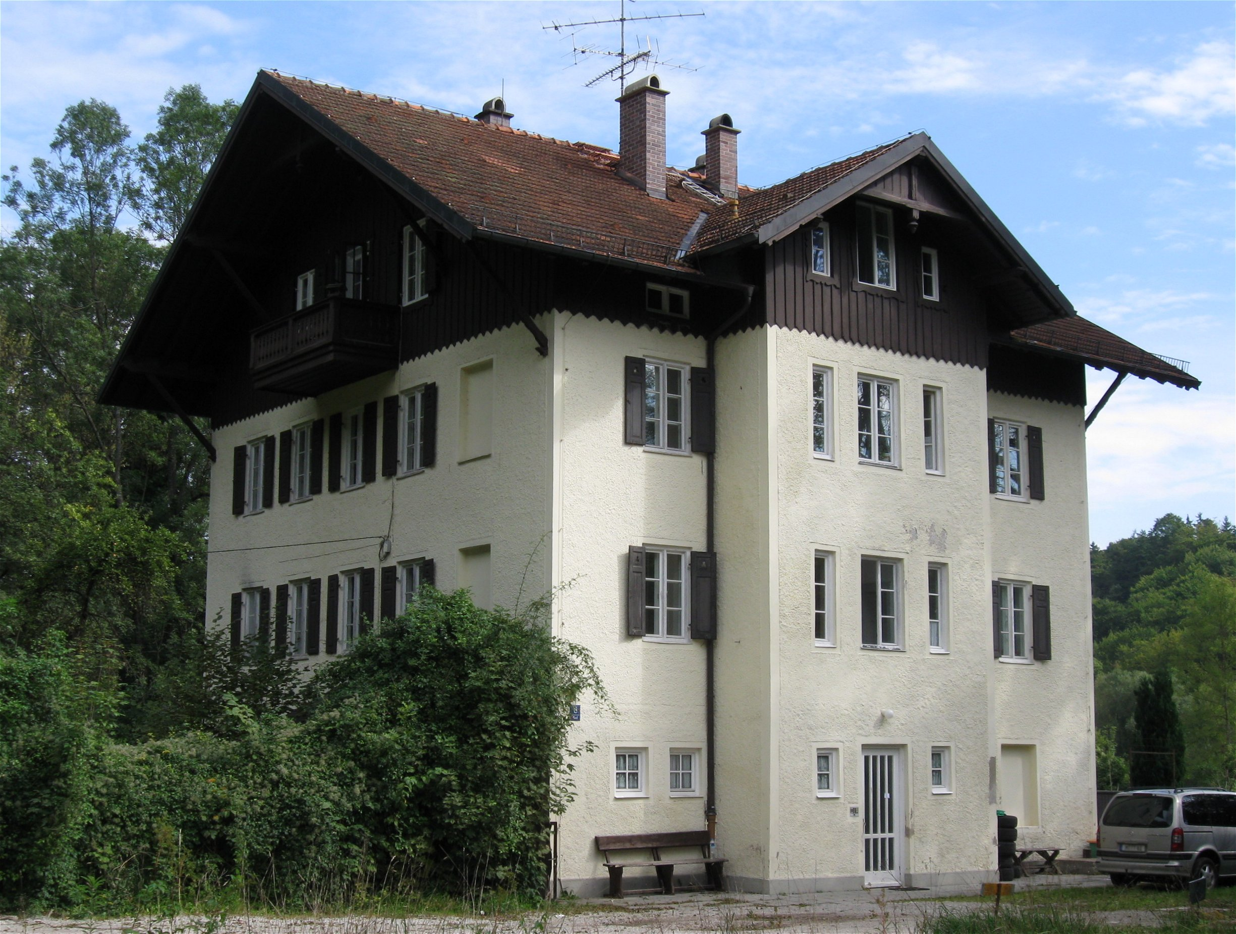 Badstraße 8; Wohnhaus, dreigeschossig, mit Flachsatteldach nach alpenländischer Art und Balkons, Ende 19. Jh., Pullach im Isartal